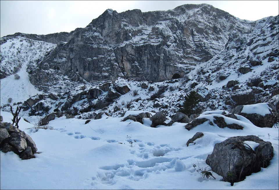 Nevada en Aitana en marzo de 2013